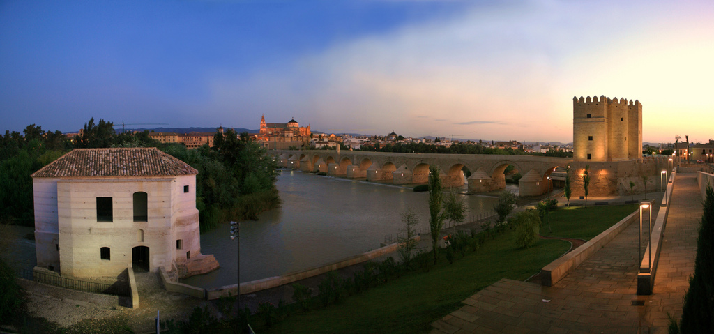 El Guadalquivir en su paso por Cordoba